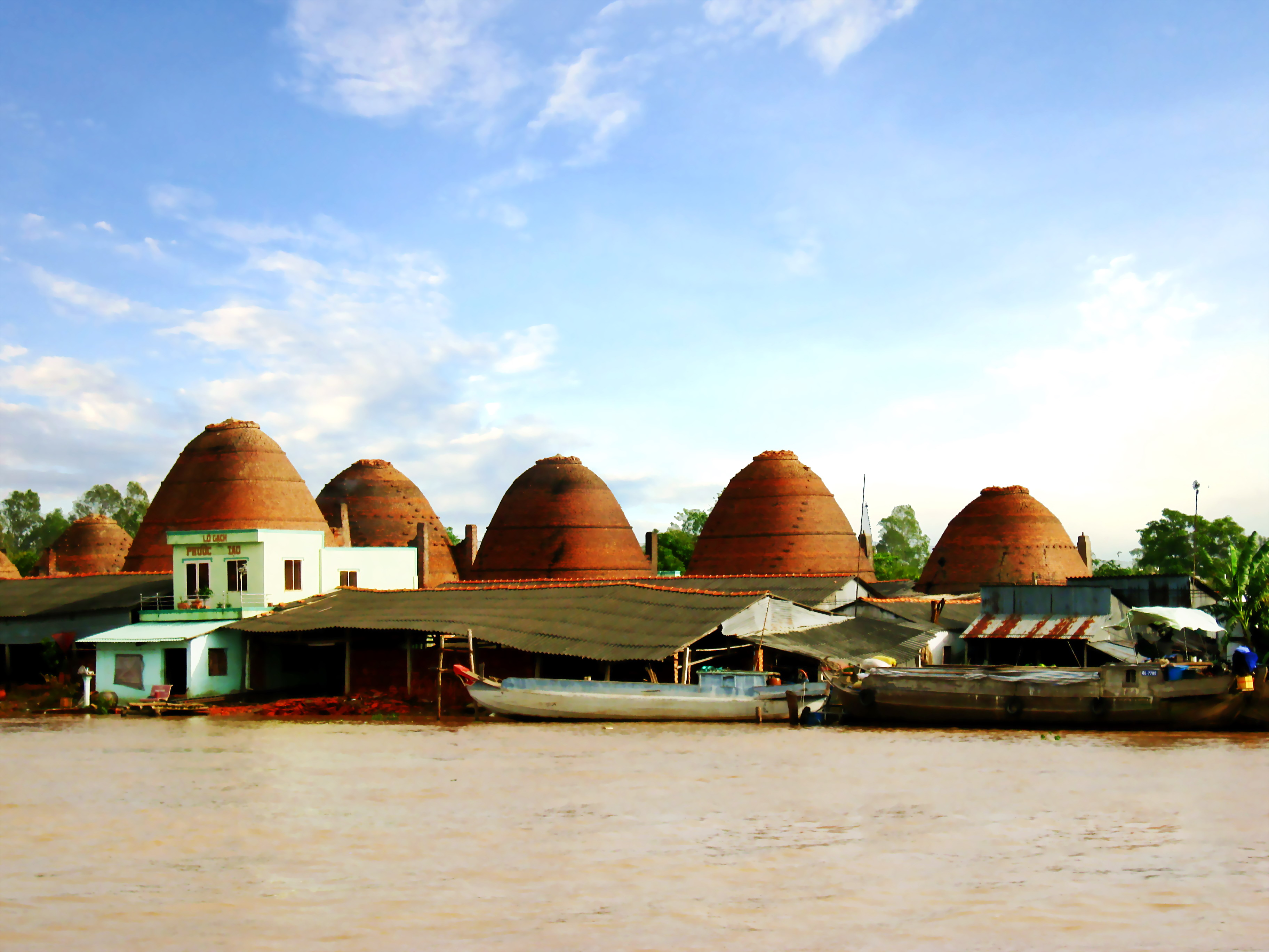 Một lò gạch ở xã An Hiệp, huyện Châu Thành, tỉnh Đồng Tháp, Việt Nam.